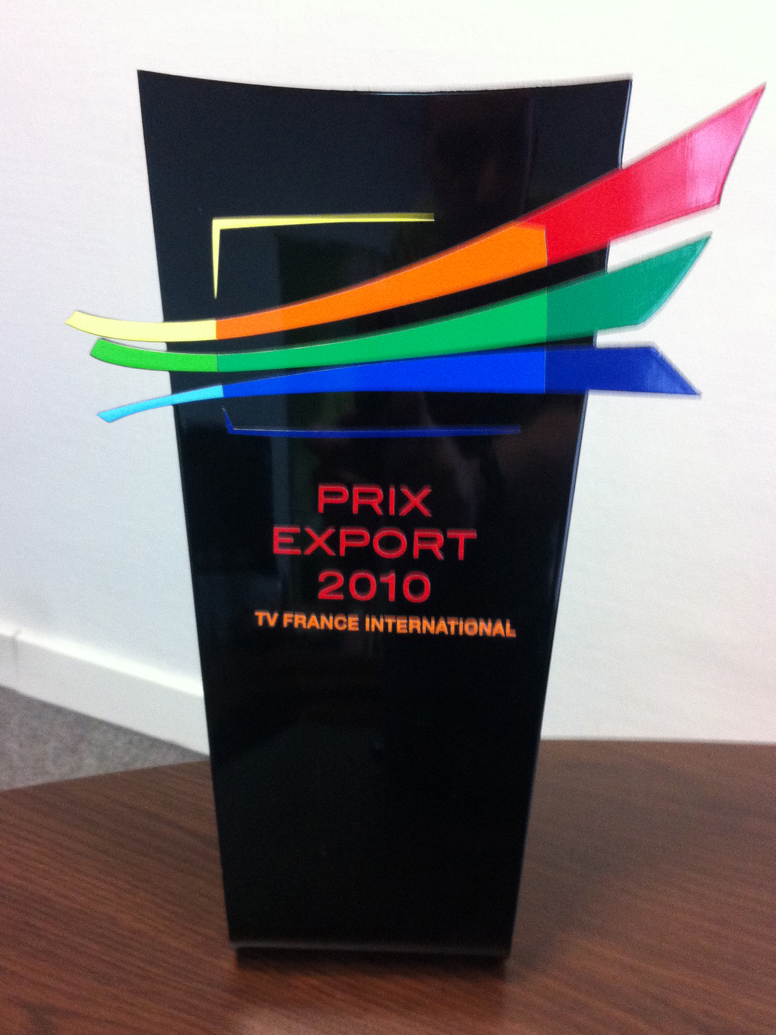 Trophée prix export 2010